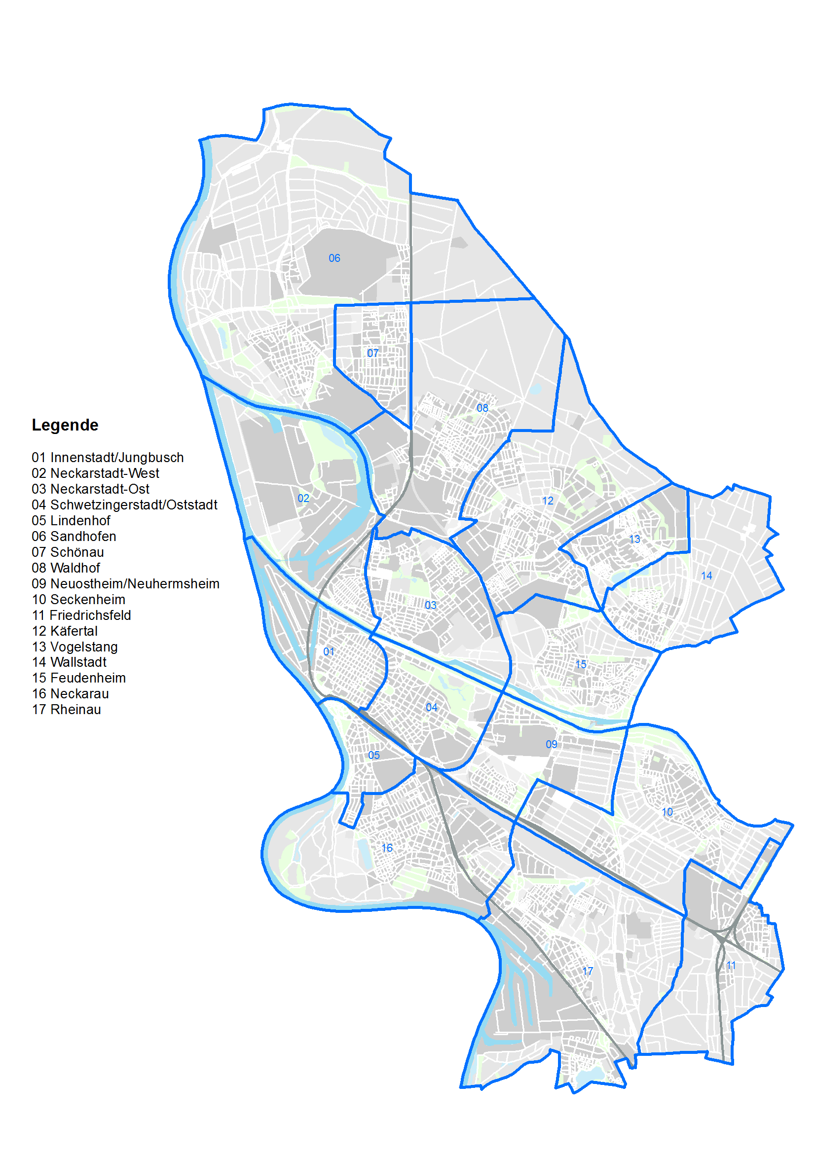 17 Stadtbezirke von Mannheim